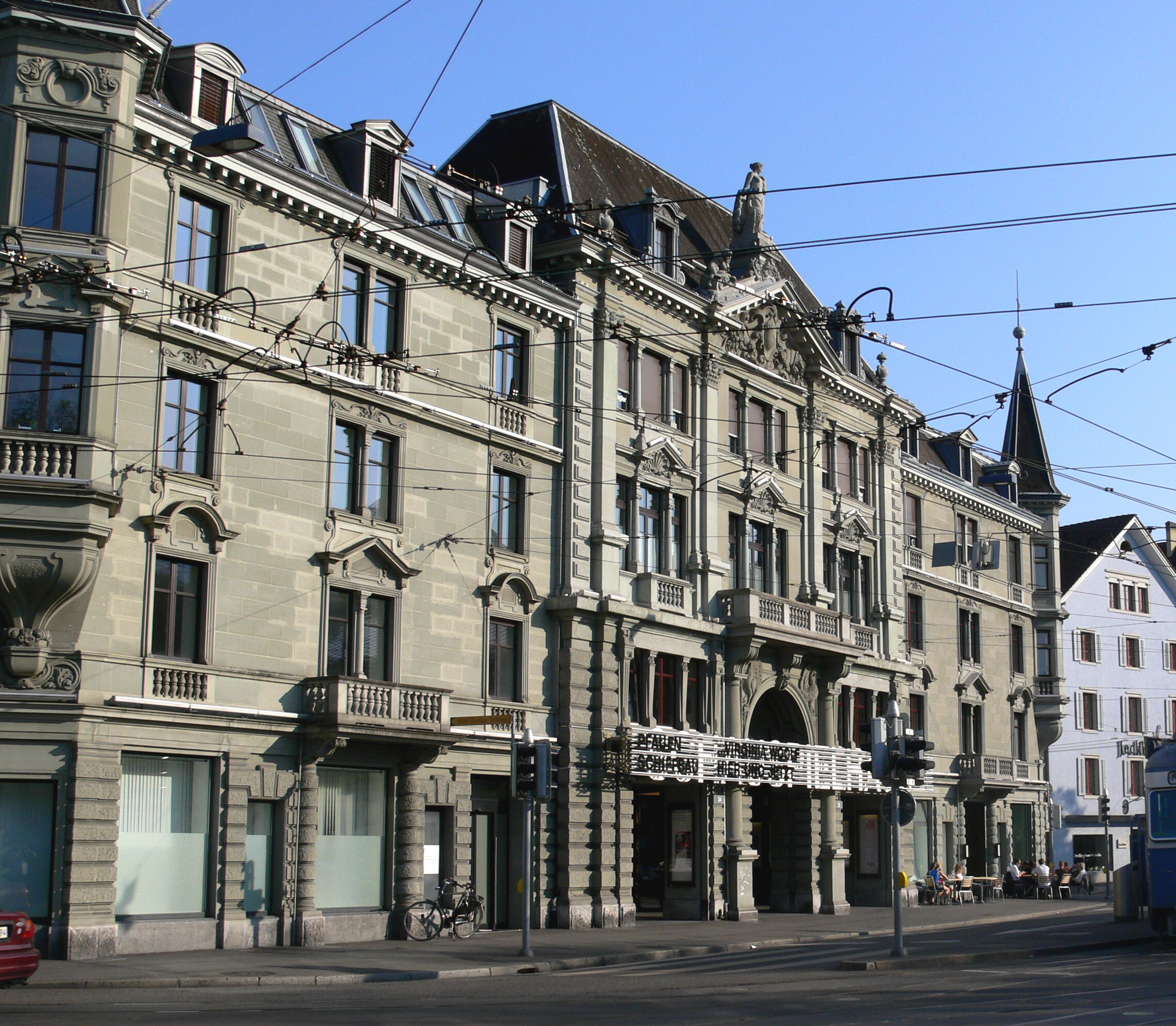 Zürich, Schauspielhaus im Pfauen